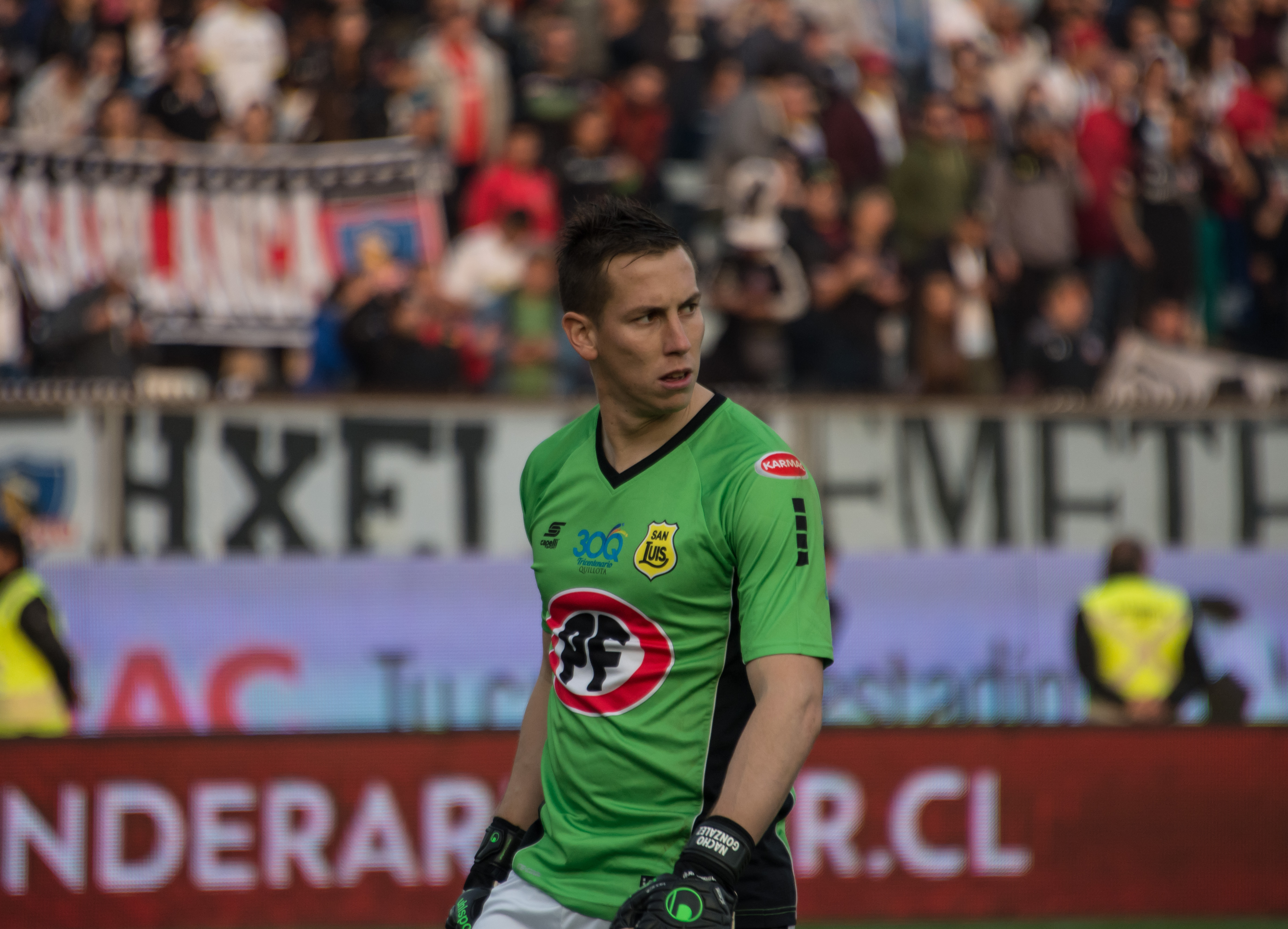 Ignacio González, Colo-Colo v San Luis, Estadio Monumental, Macul, Santiago, Chile.